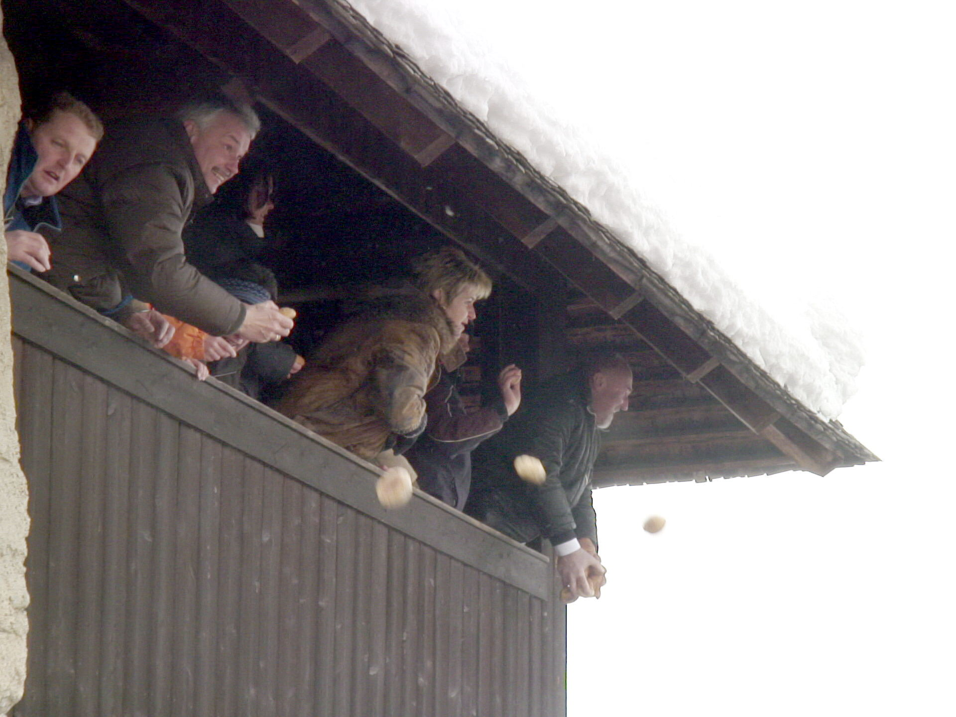 Striezelwerfen at Stein im Jauntal, Sankt Kanzian am Klopeinersee, Carinthia, Austria